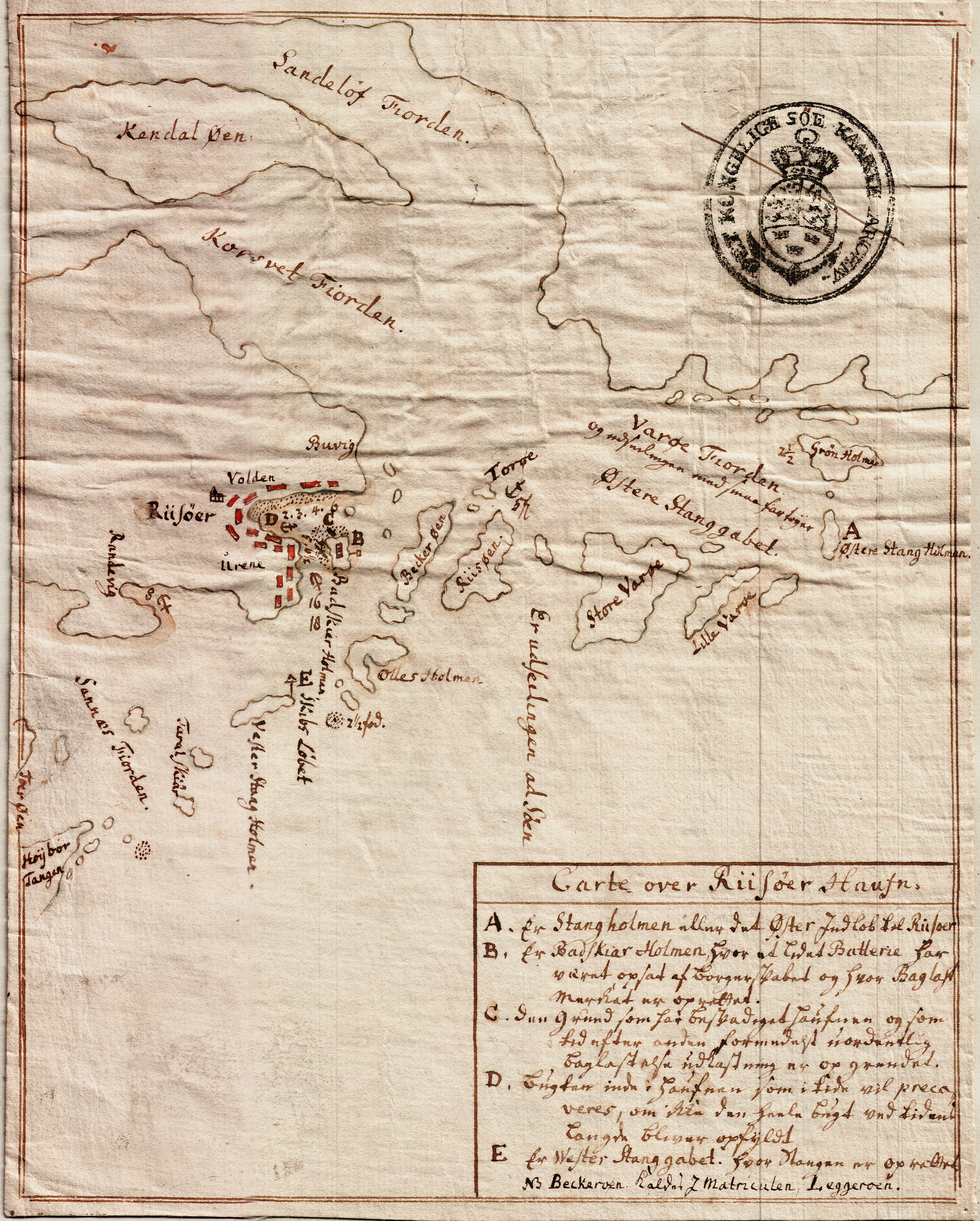 Sjøkart over kysten fra Risør til Grønholmen fra ukjent årstall. Håndtegnet i ukjent målestokk. Original kartstørrelse ca 18 x 22 cm. Et eksemplar befinner seg hos Statens kartverk Sjø i Stavanger.